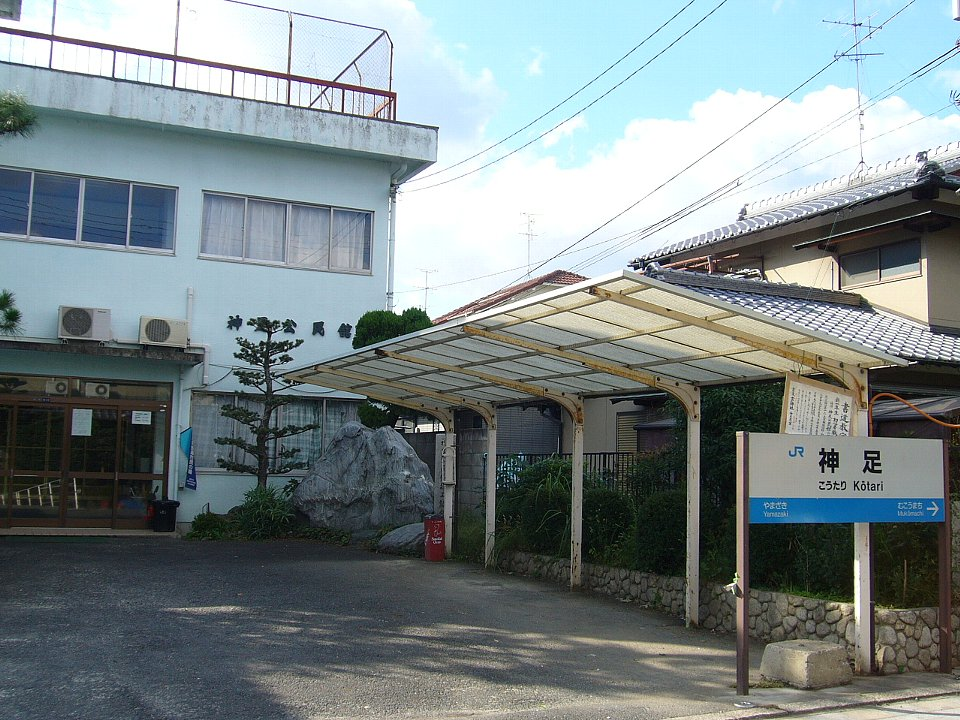 神足公民館前に保存されている神足駅（現・長岡京駅）駅名標